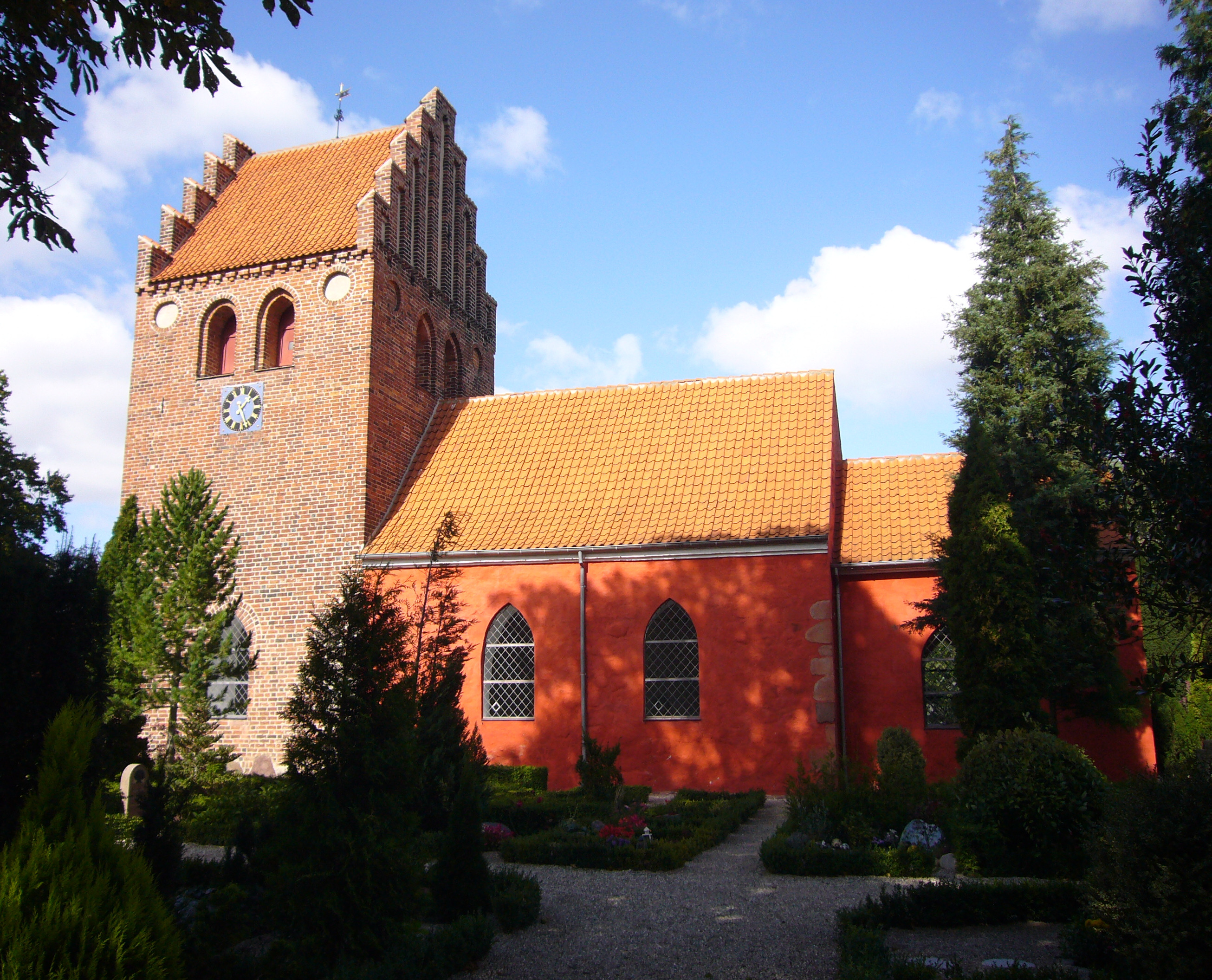 Herstedøster Kirke, Albertslund, Denmark. Herstedøster Kirke